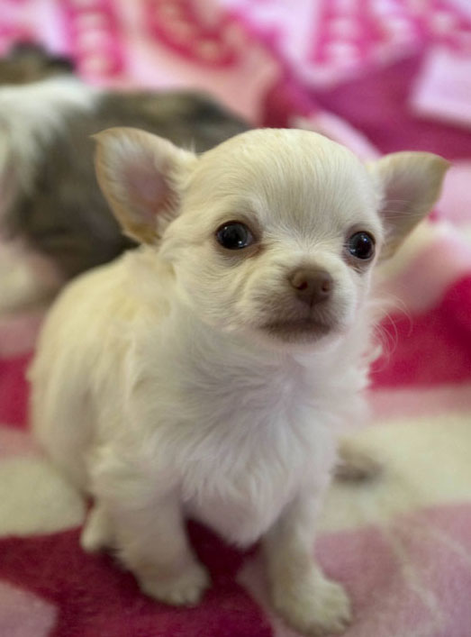 真っ白だった毛に、少し色がついてきた。